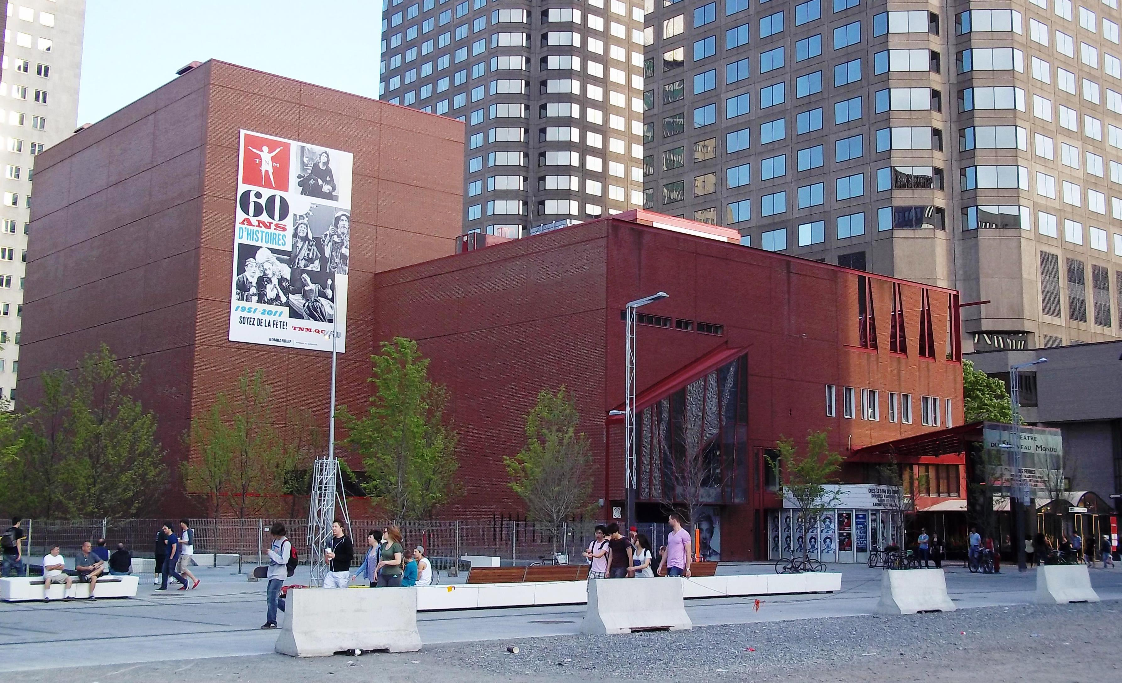 Le Théâtre du Nouveau Monde est situé au 84 rue Sainte-Catherine ouest à Montréal.